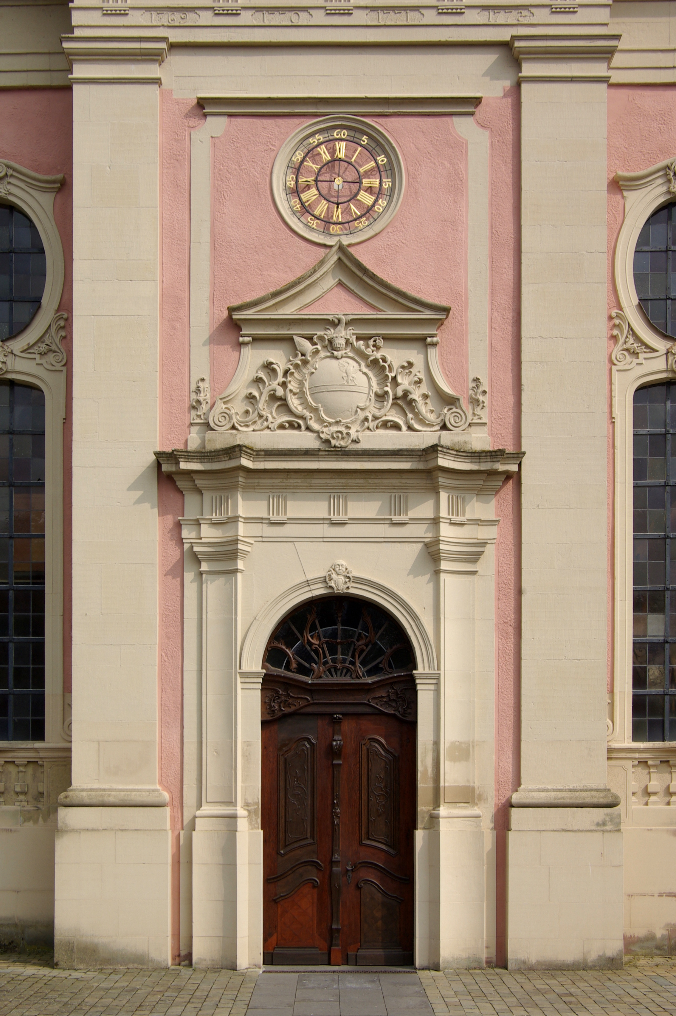 Klosterkirche Springiersbach, Eingang